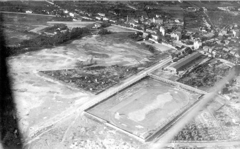 Stadion przy ul. Sportowej w Toruniu i jego okolica, sfotografowane najpóźniej w latach 20. XX wieku.